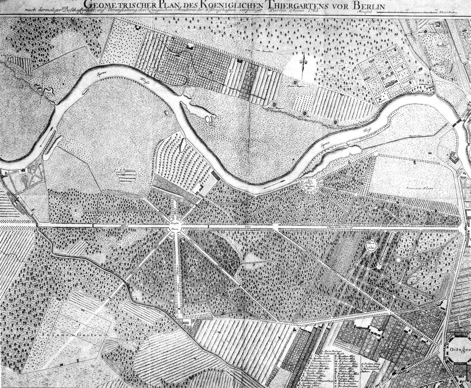 plan of Tiergarten park in Berlin ("Geometrischer Plan des Koeniglichen Tiergarten vor Berlin") 1765; area between park and left Spree meander: Schöneberger Wiese, location of later Hansaviertel